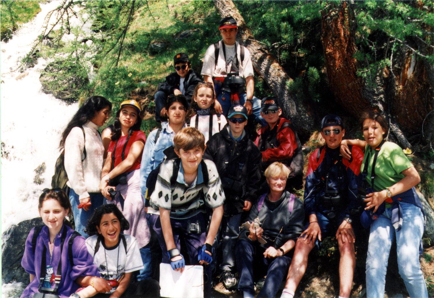 La classe d'accueil en course d'école. Image tirée du film « Classe d’accueil » de Fernand Melgar.